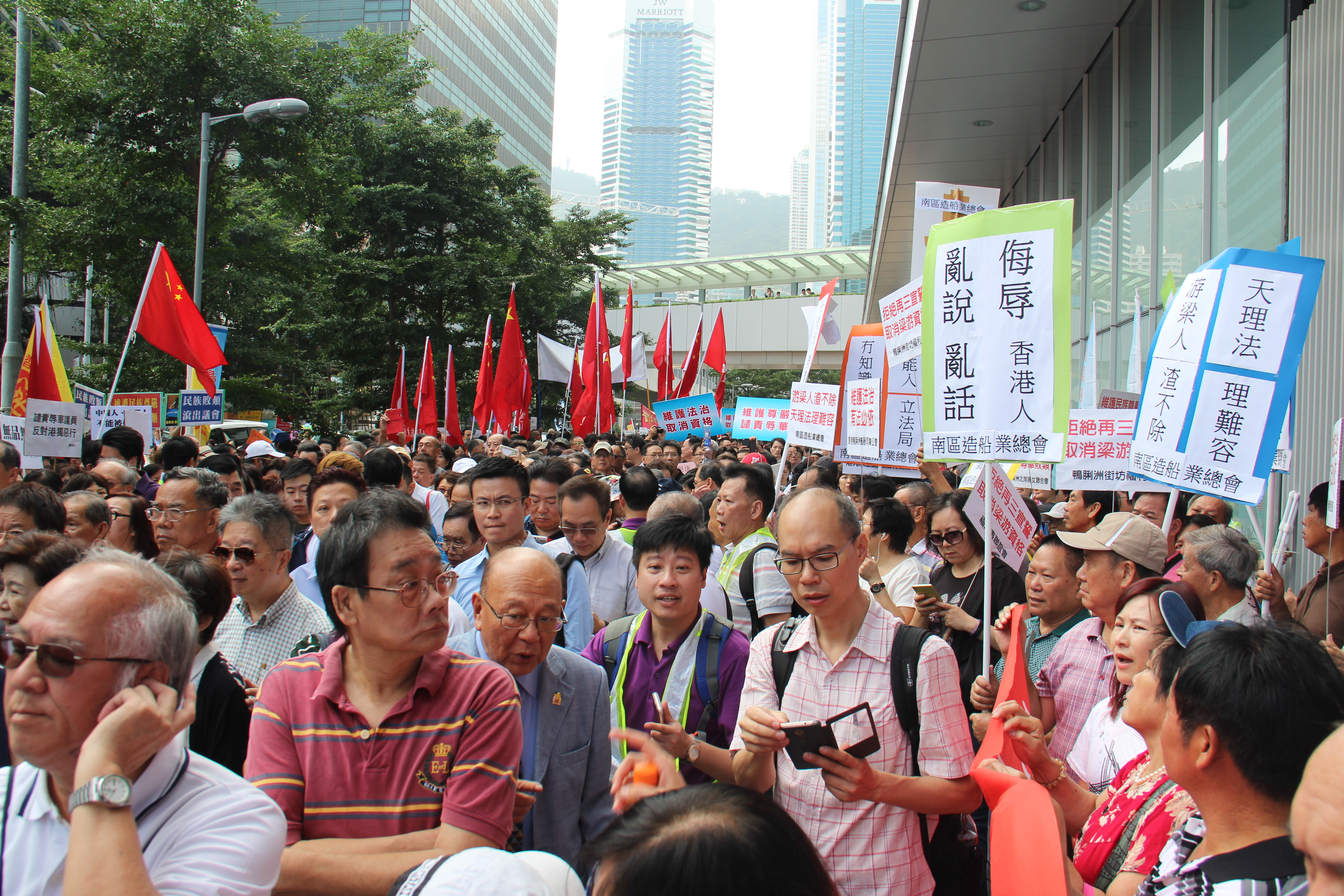 香港立法會10月26日上演驚人政治大戲（美國之音海彥拍攝） 在親中建制派上週三製造立法會流會阻止青年新政梁頌恆和遊蕙禎再次宣誓，並政治施壓逼迫立法會主席梁君彥改變自己先前裁定，宣布押後兩人宣誓後，10月26日的立法會大會成為外界關注的焦點。同聲譴責梁君彥讓政治凌駕法律的非建制派議員，週三上午組成人鏈，成功護送梁頌恆和遊蕙禎進入議事大廳要求宣誓，但最終梁君彥以無法恢復會議廳秩序為由宣布休會，再次阻止兩人宣誓。